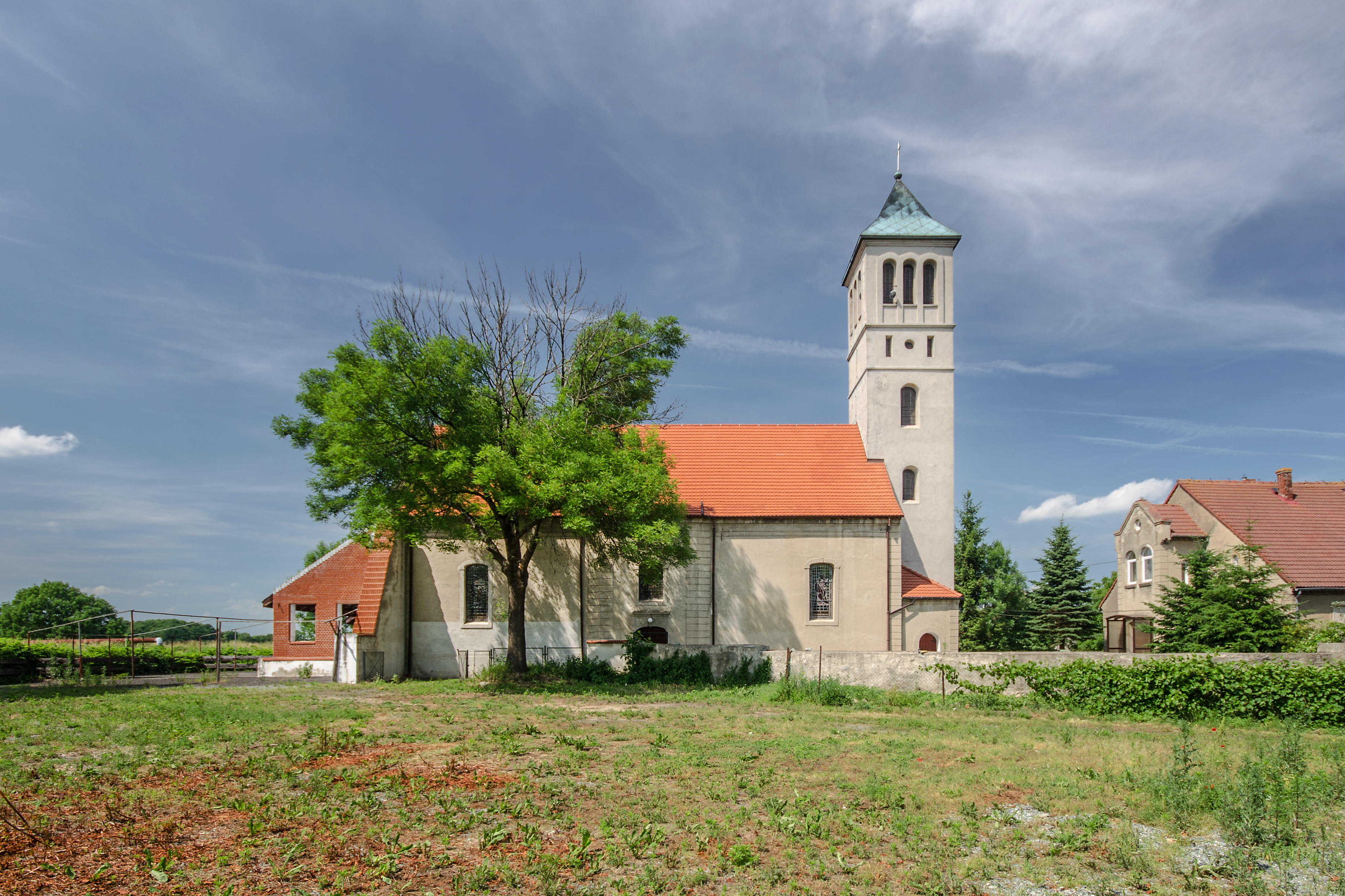 Nasławice, kościół par. p.w. św. Józefa Oblubieńca, 1707, 1859